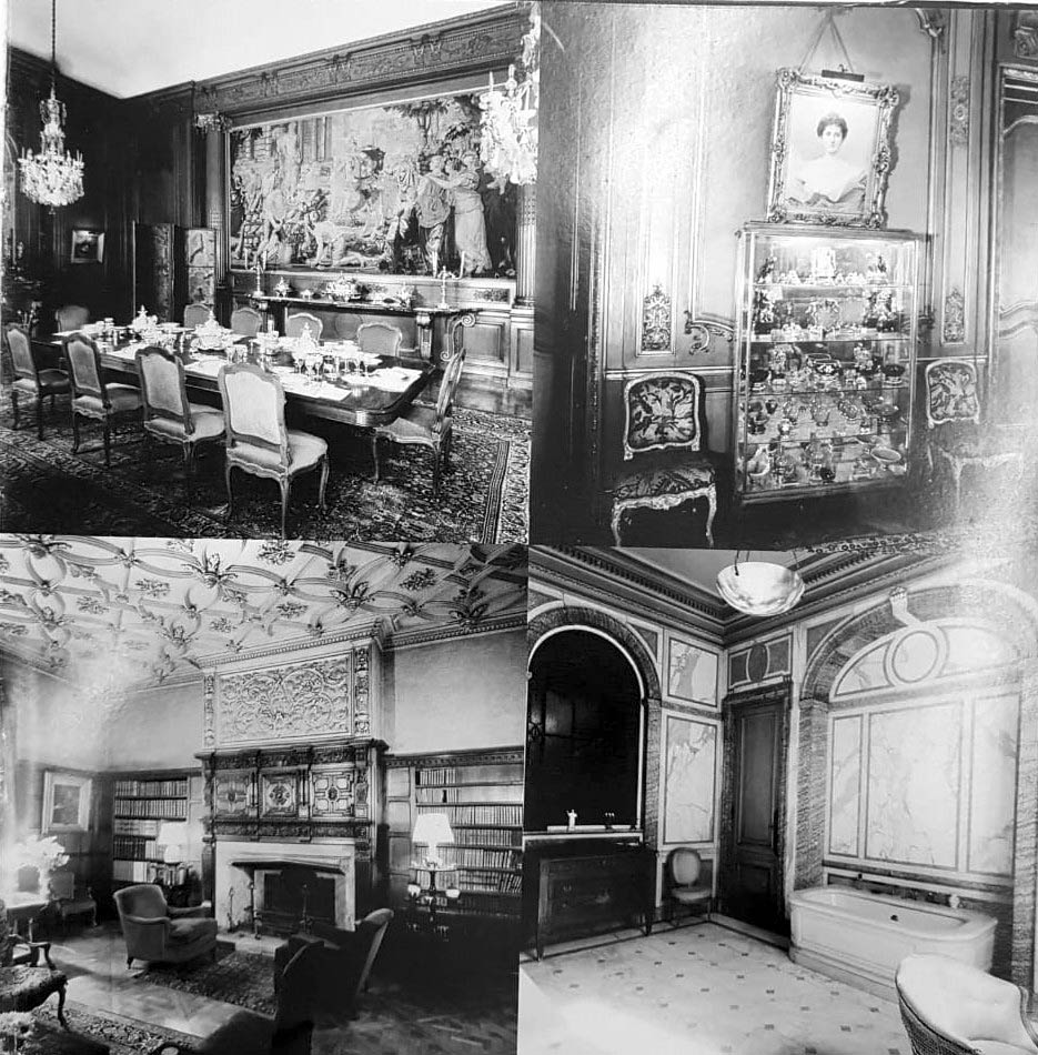 interior del la Mansion Unzue de la epoca del 90